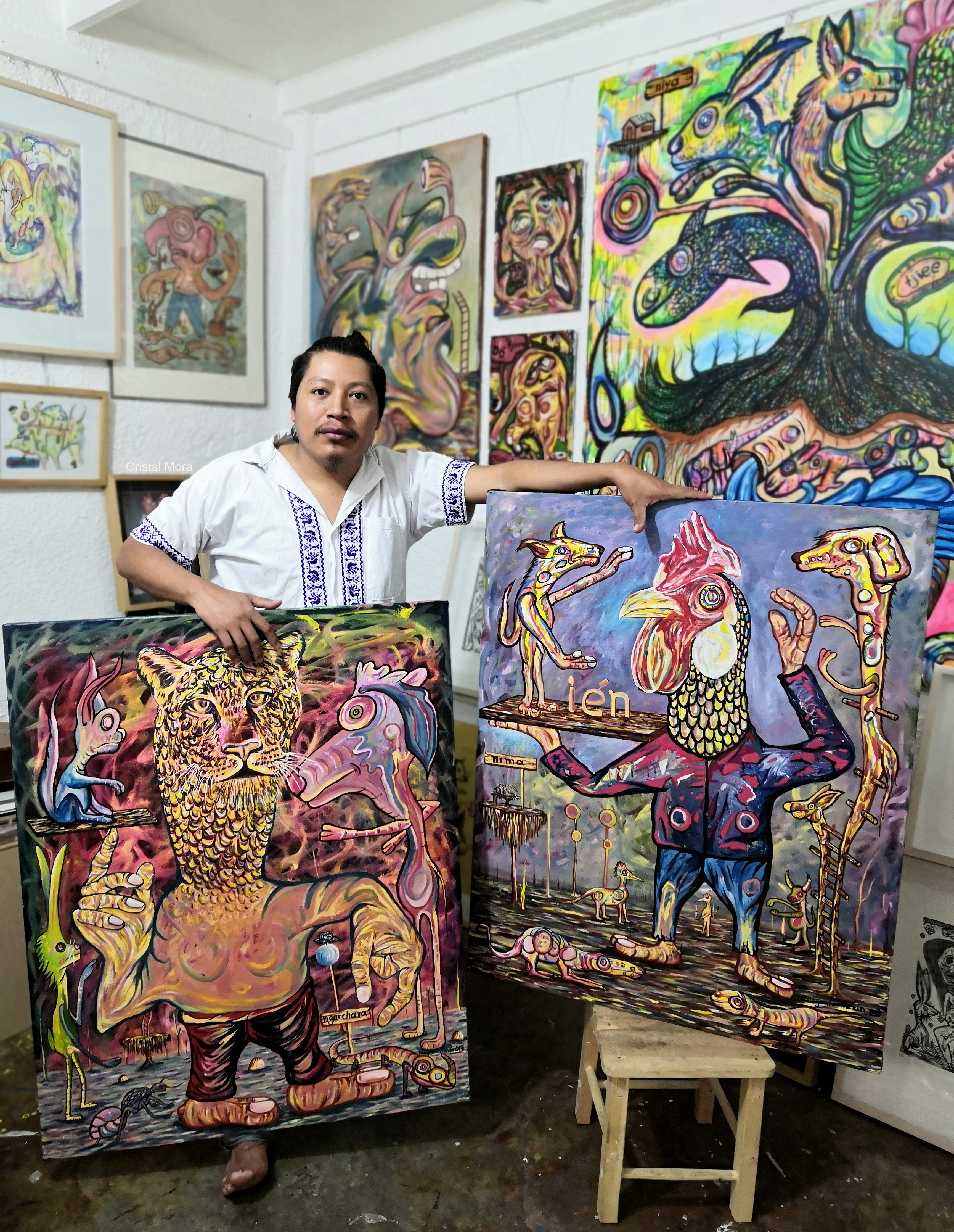 Artista visual Filogonio Naxín en su estudio en la Ciudad de México